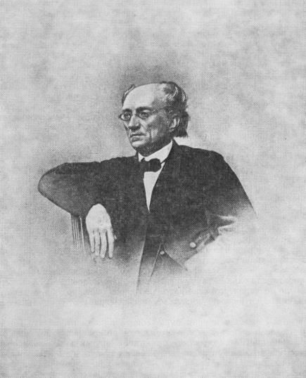 Фотография Фёдора Ивановича Тютчева. Петербург, май 1864 г.